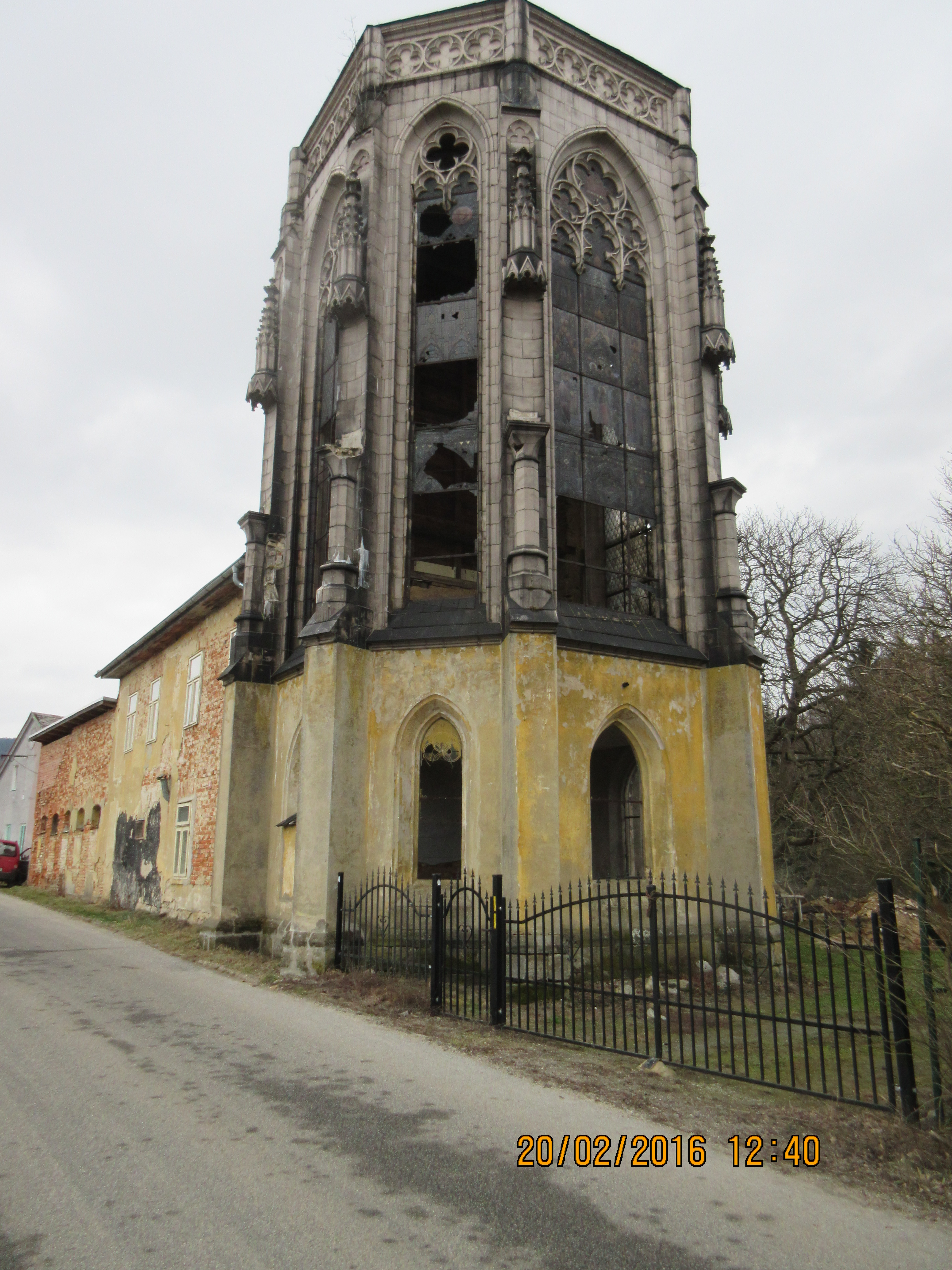 Kulturní památka mezi Okrouhlou a Skalicí, adresa Okrouhlá 93